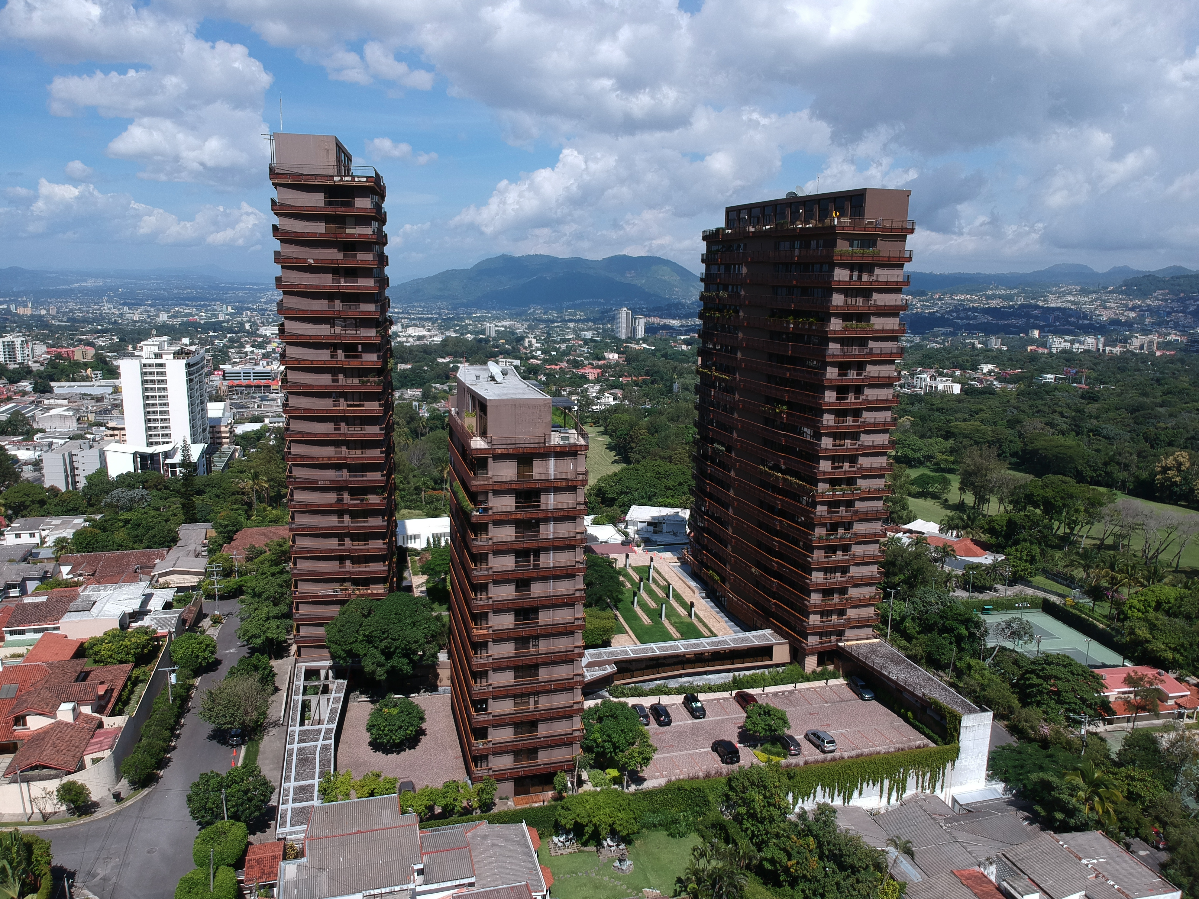 Torres Campestre